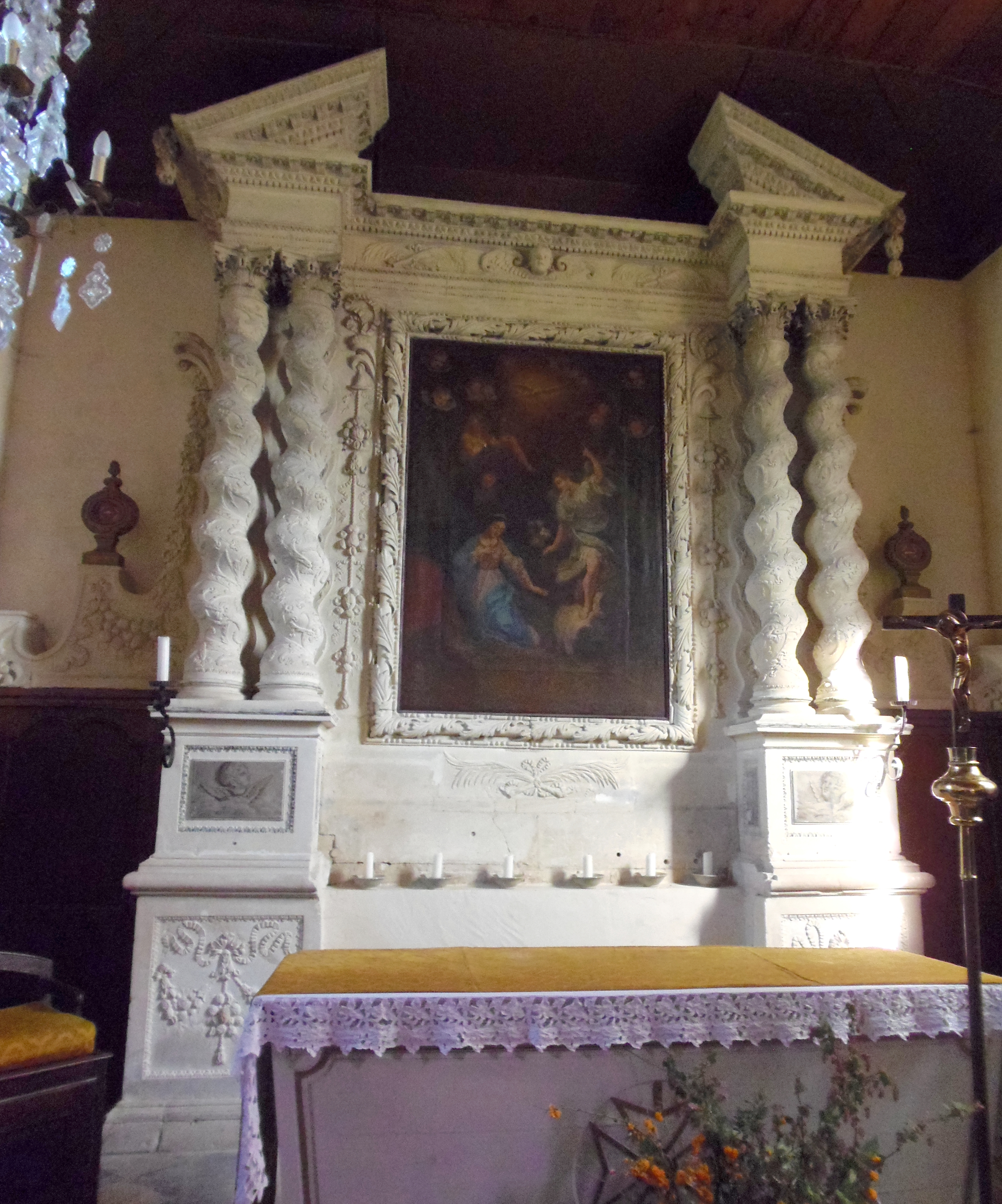 Arganchy (Normandie, France). Le maitre-autel de l'église Sainte-Radegonde.